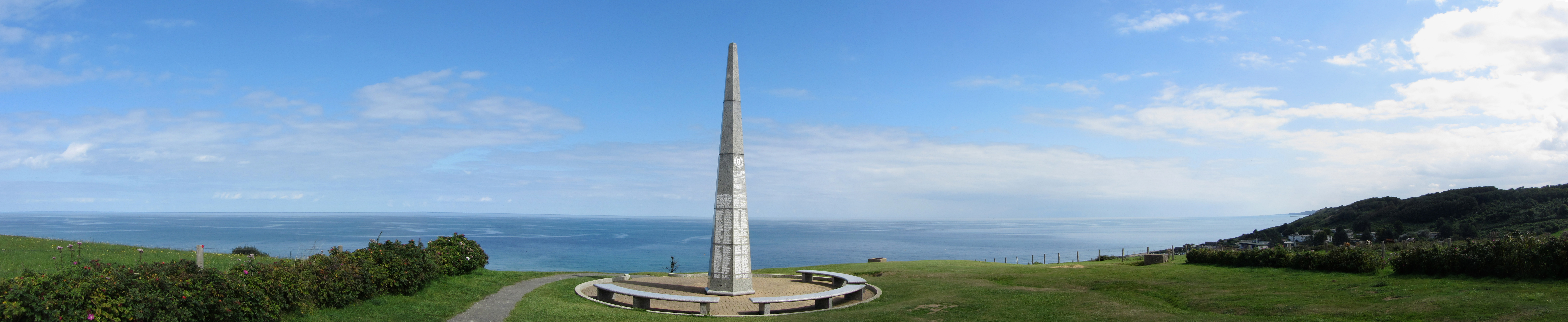 Obelisk bei Omaha Beach